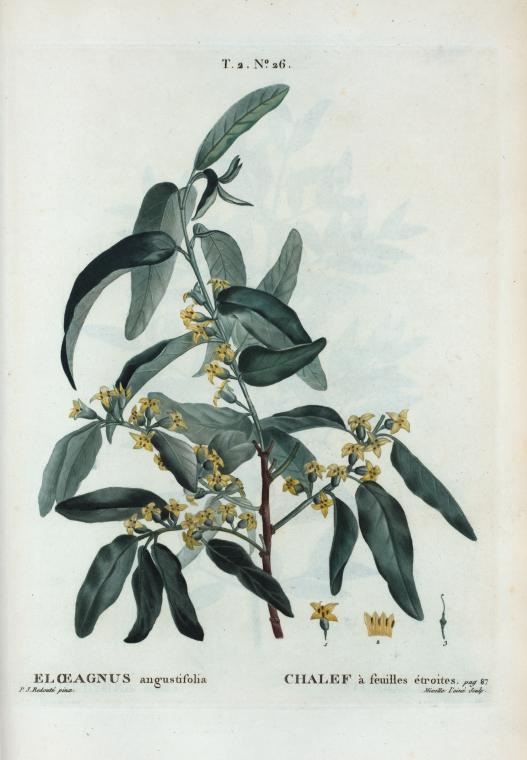 Elaeagnus angustifolia = Chalef à feuilles étroites.